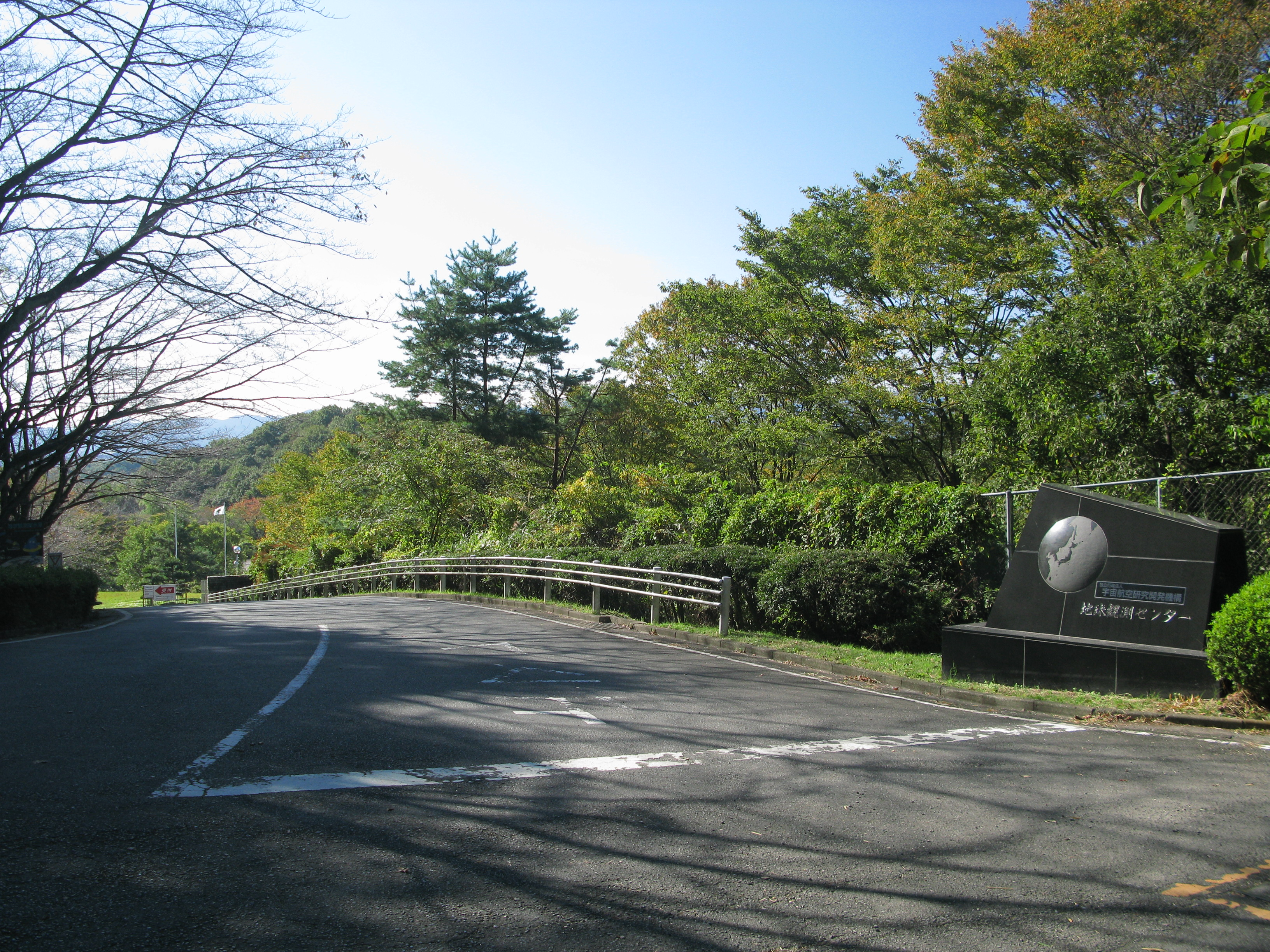 地球観測センター 入口（埼玉県東松山市）